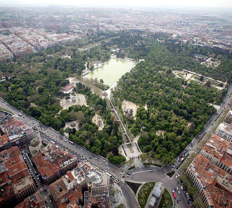 El parque de El Retiro abrirá sus puertas a las 14.00 horas de hoy, sábado 2 de febrero, tras permanecer cerrado desde las 14.00 horas de ayer por los fuertes vientos que se registraron en la ciudad, y en aplicación del protocolo de actuación ante la previsión de situaciones meteorológicas excepcionalmente adversas. Tras la revisión del arbolado, no se han detectado grandes incidencias.